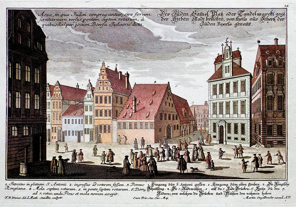 1. Eingang für S.Antoni gassen.2. Eingang zum alten Graben.3. Rongisches Gehäusung 4. Die 7 Rademühlen.5. auf die 7 Radebrücken.6. Haus zu den 7 Rädern, von welchem die Brücken und Mühlen den nahmen haben.